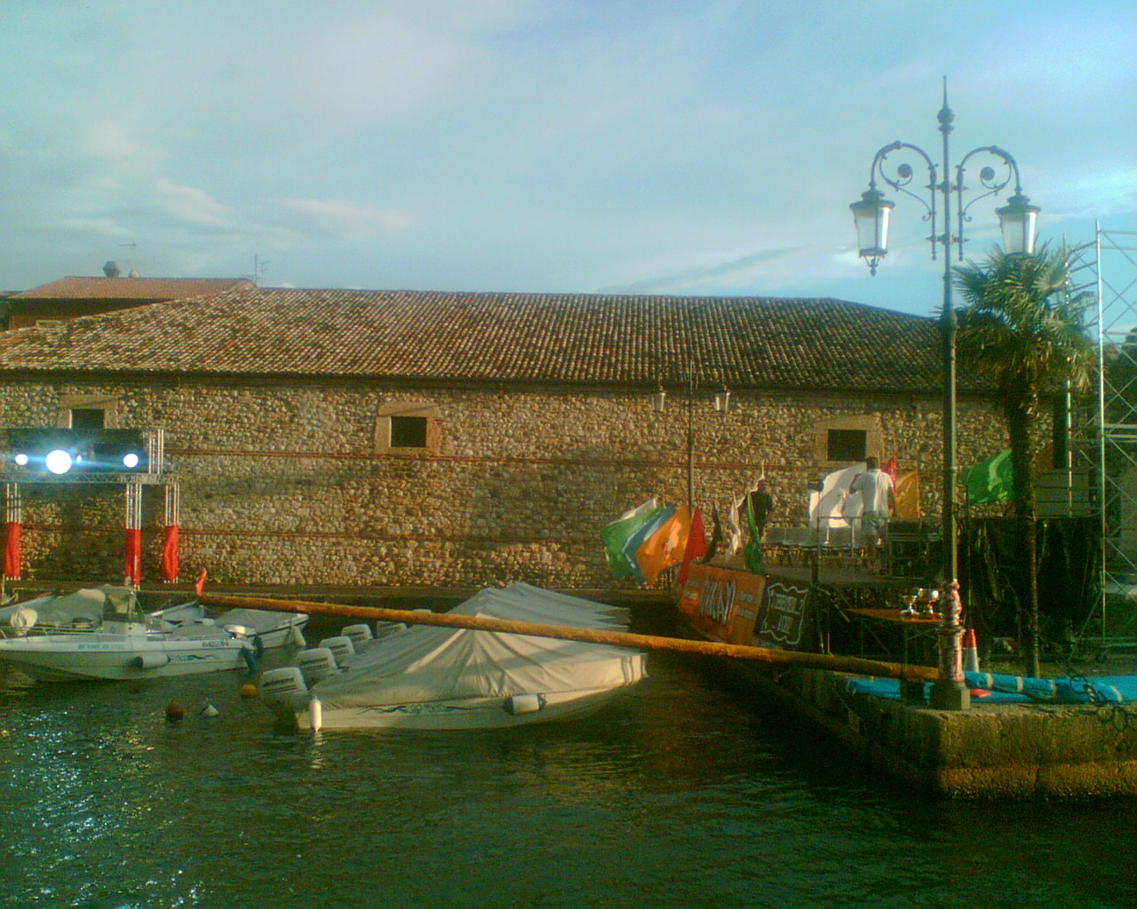 Palo della Cuccagna del Cadenon Fonte: opera propria Autore: Claudio Olivetti Data: 2009-08